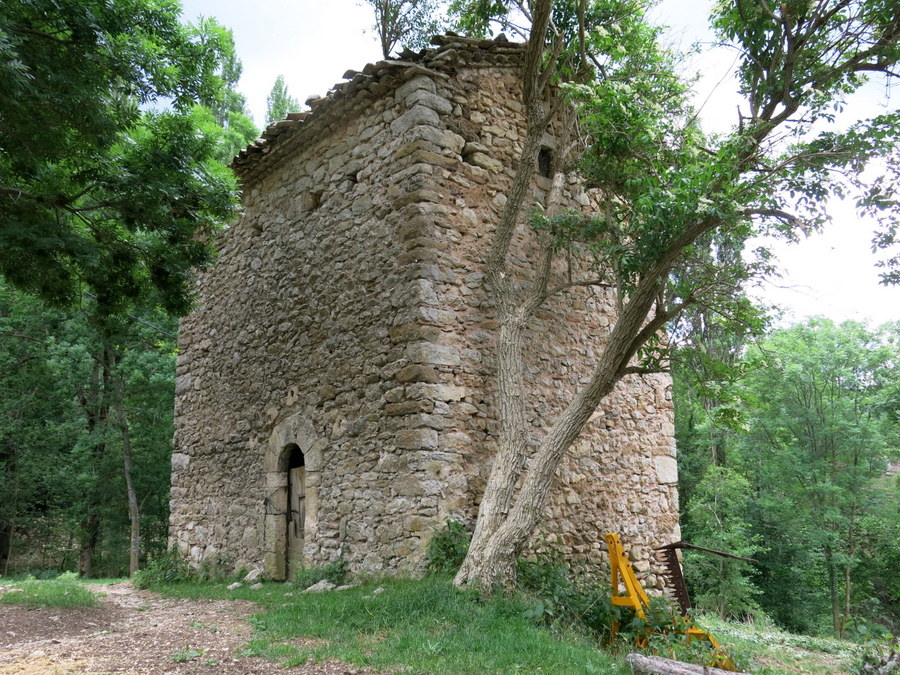 Torre de Riu, Castellar de Riu, Bergadà - Catalunya